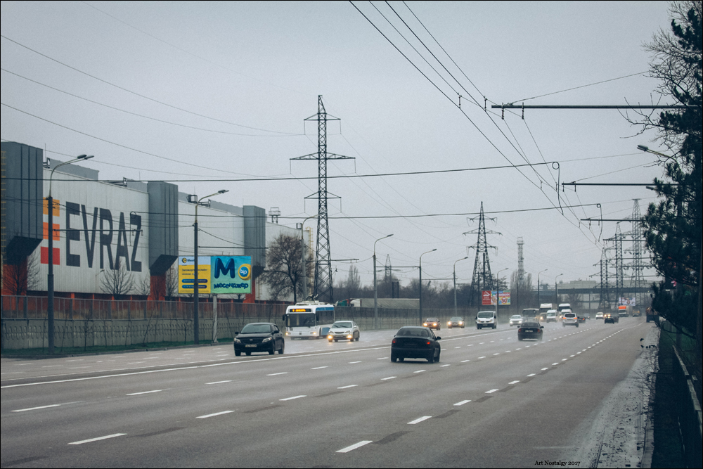 набережна в районі Стана 550